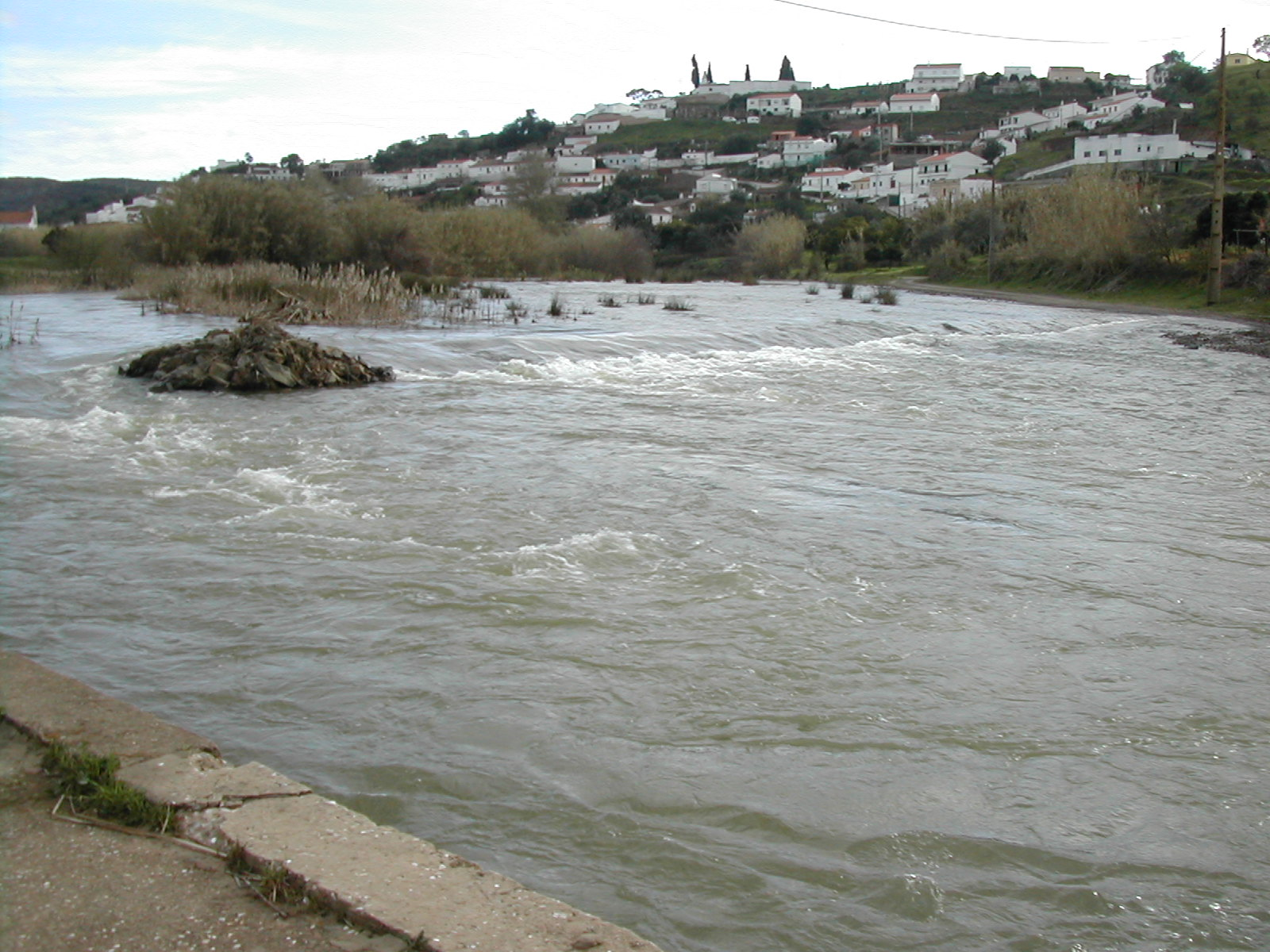 Ribeira de Odeleite, Odeleite, Portugal